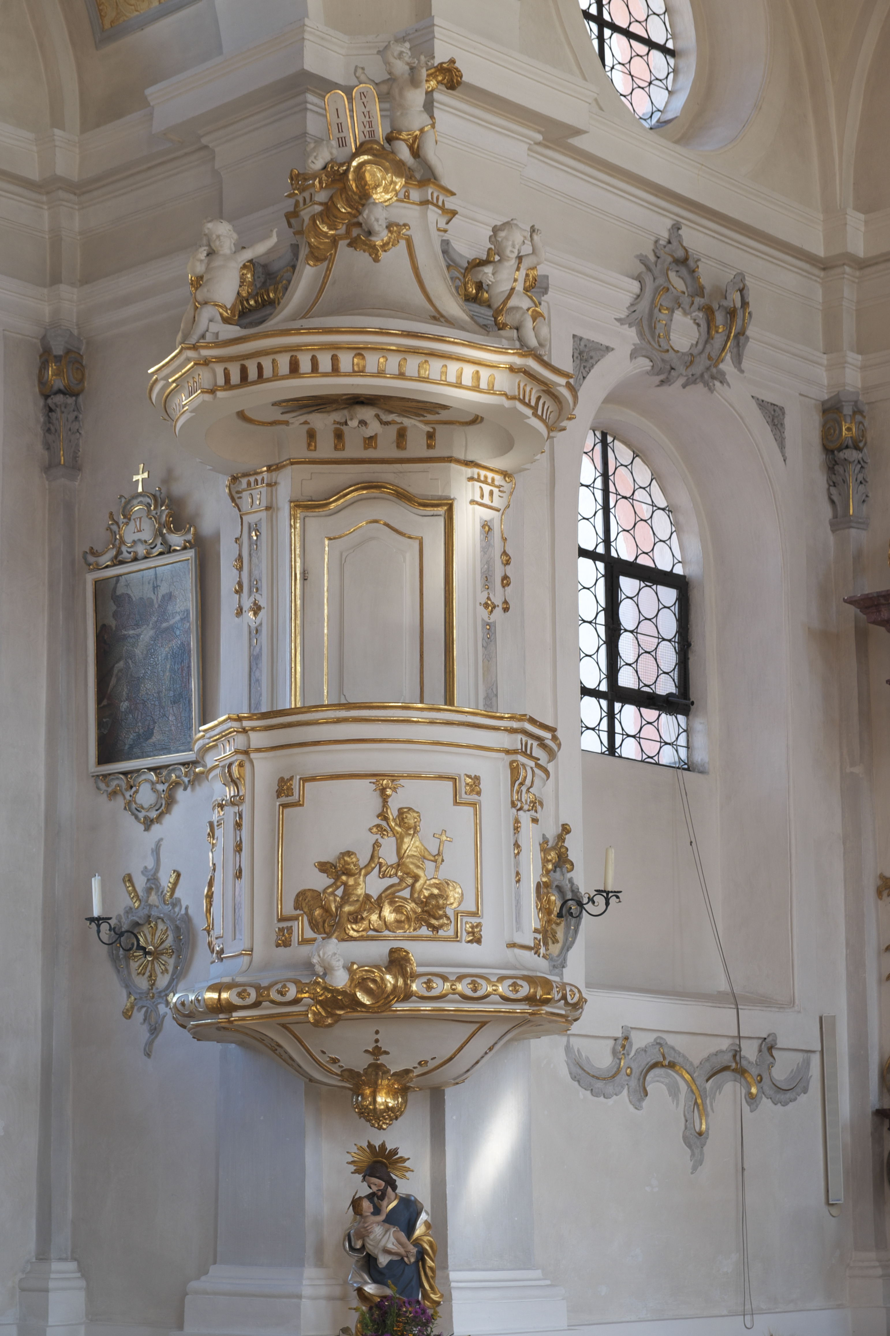 Katholische Pfarrkirche St. Nikolaus in Reichling im Landkreis Landsberg am Lech (Bayern/Deutschland), Spätrokoko-Kanzel